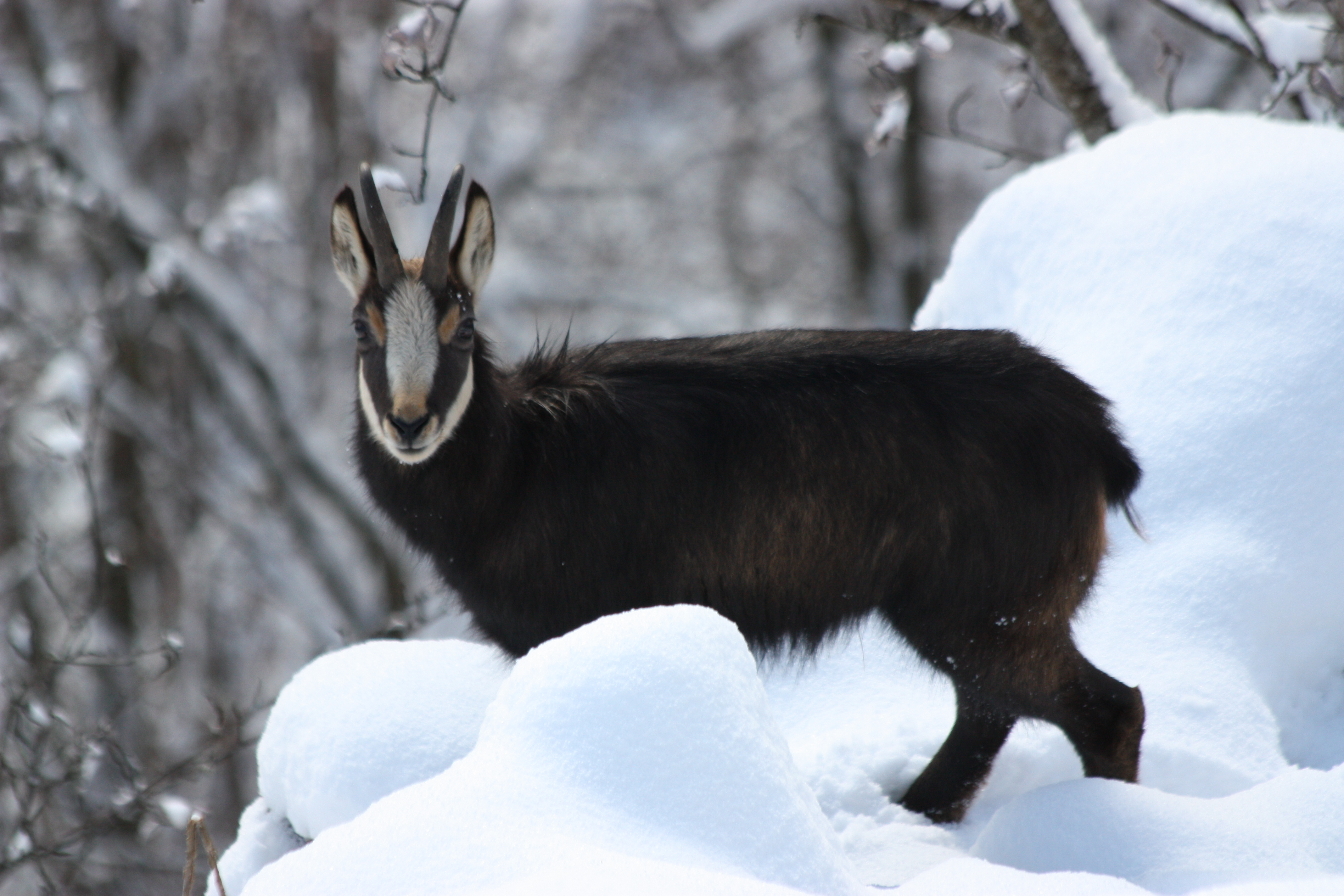 Chamois à Morez